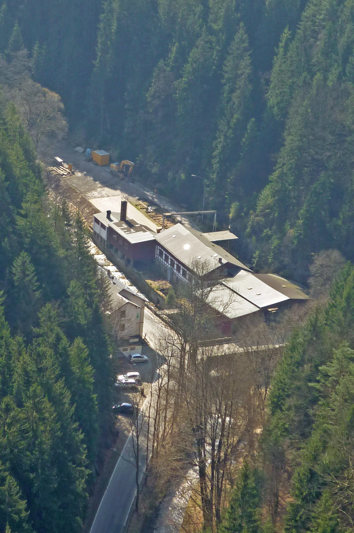 Blick vom Großstein auf die Felsenmühle im Kirnitzschtal